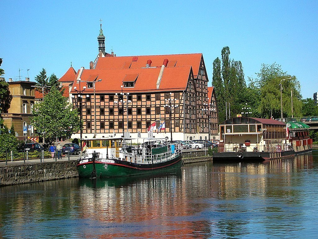 Spichrze w Bydgoszczy